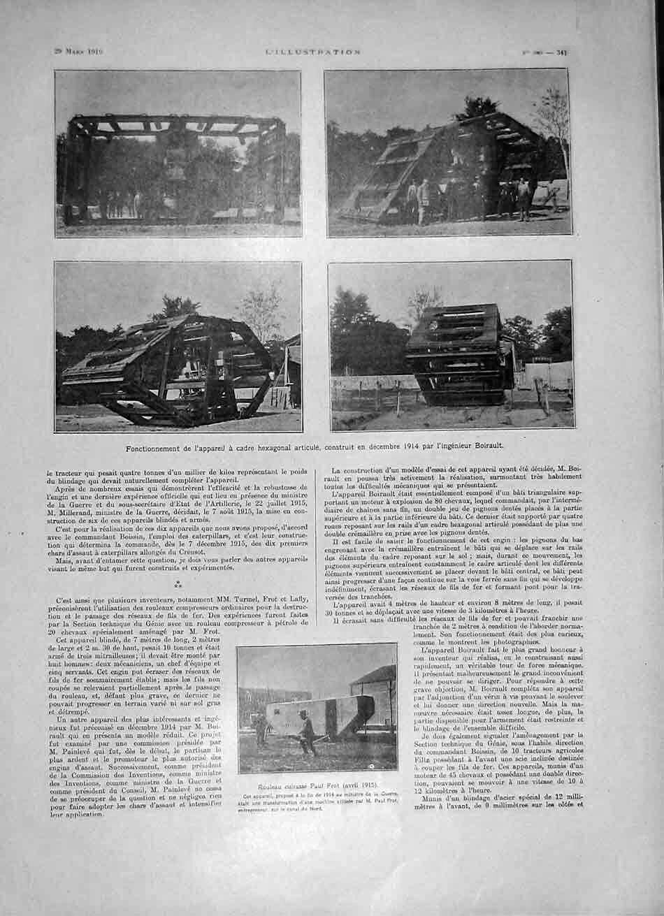 Illustration 1919 Machine Boirault